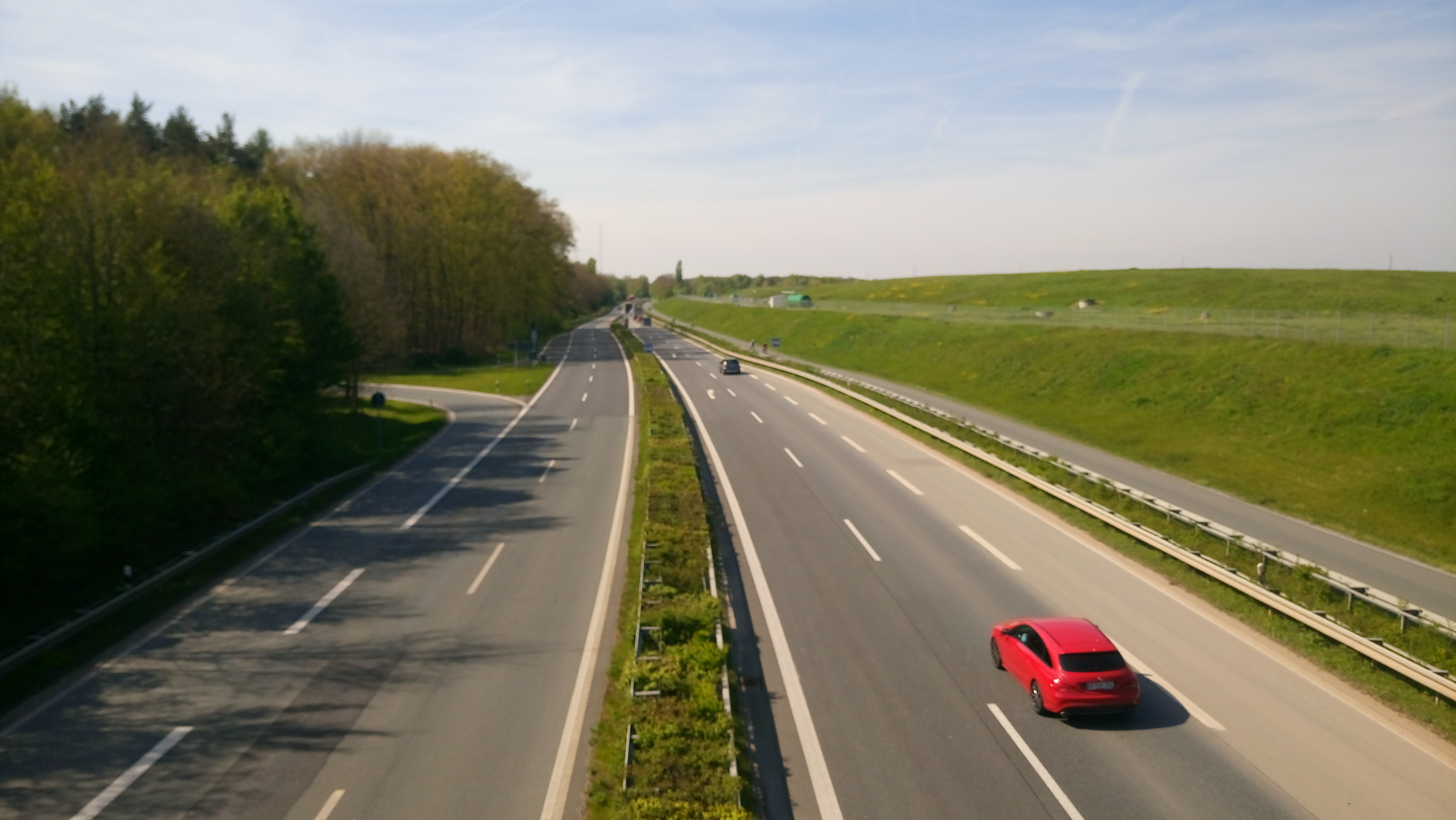 Ende der Ausbaustrecke der Bundesstraße 469 bei Stockstadt am Main